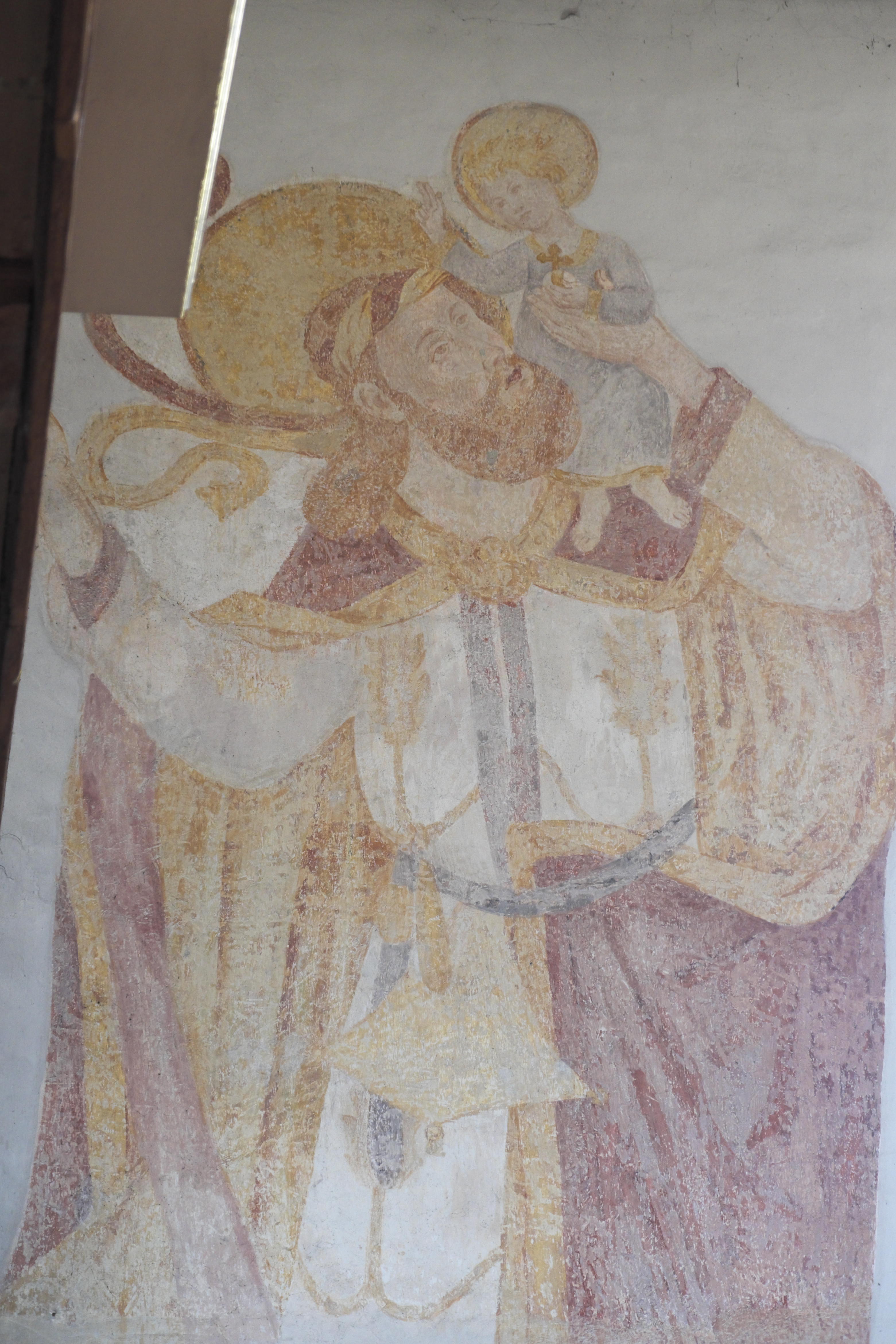 Katholische Filialkirche Unsere Liebe Frau in Gauting im Landkreis Starnberg (Bayern, Deutschland), Wandmalerei; Darstellung: Heiliger Christophorus